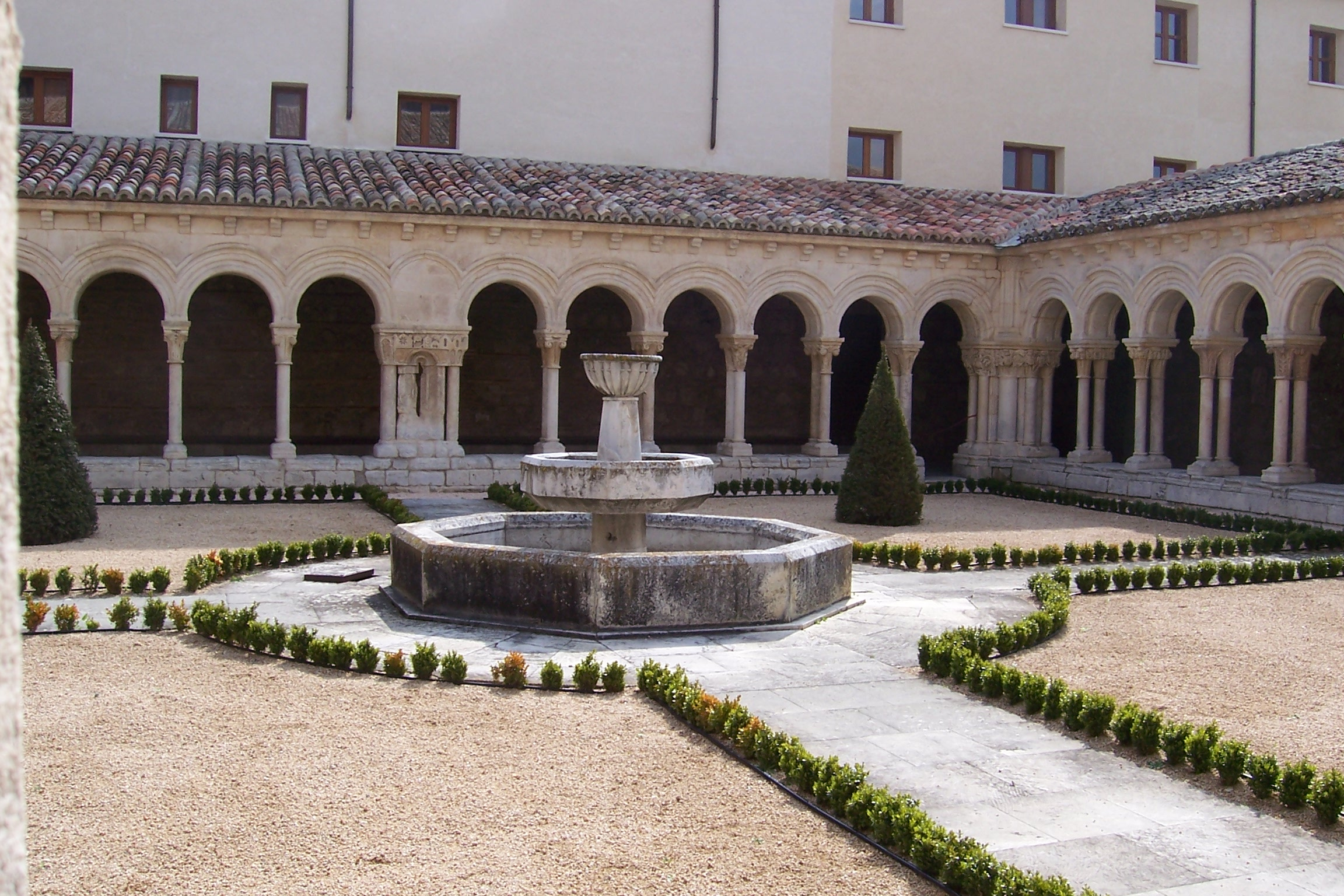 Claustro llamado las Claustrillas en las Huelgas Reales de Burgos (España). Cloister named Las Claustrillas in Las Huelgas Reales, Burgos (Spain).